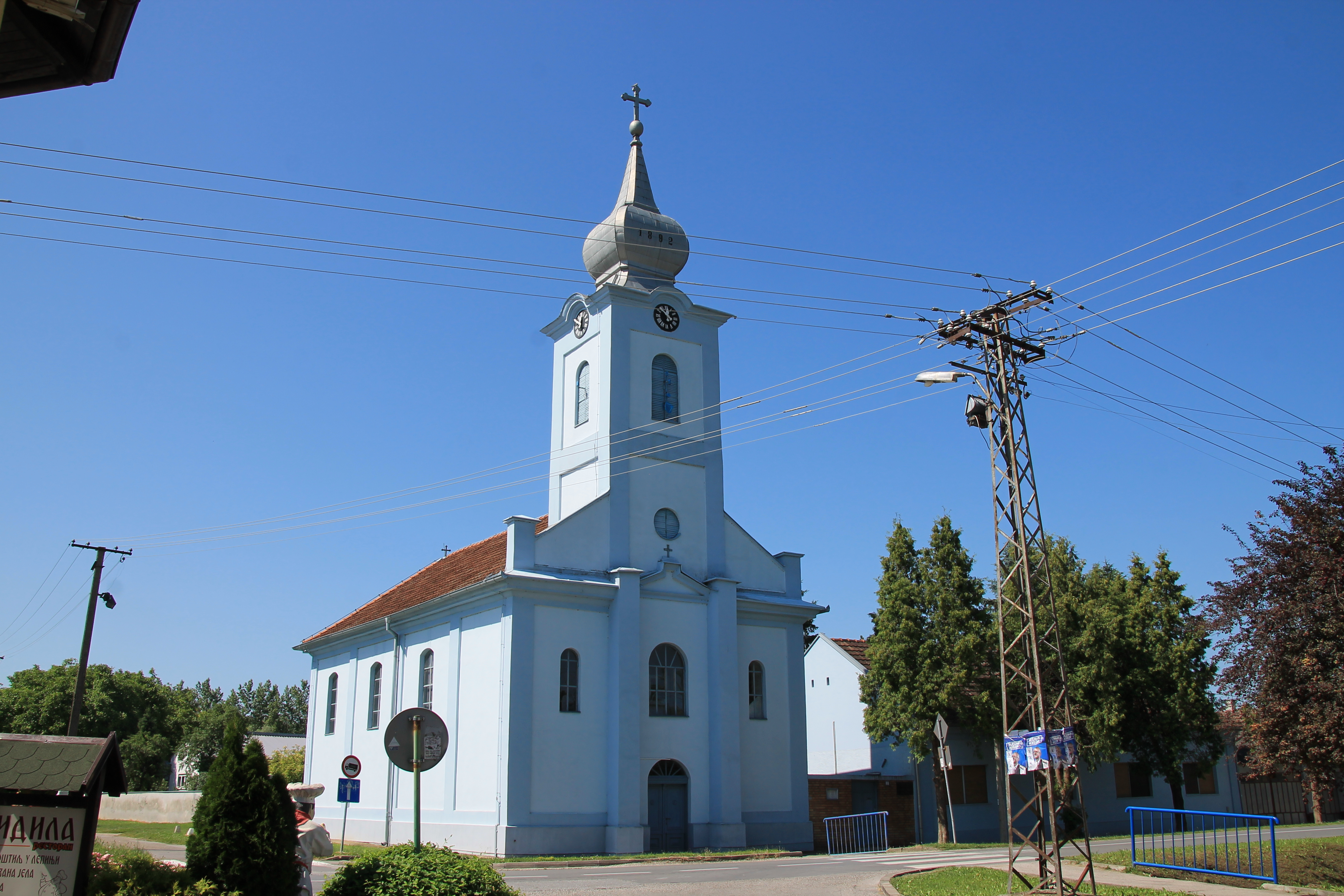 Slovačka evangelistička crkva (Bačka Palanka)